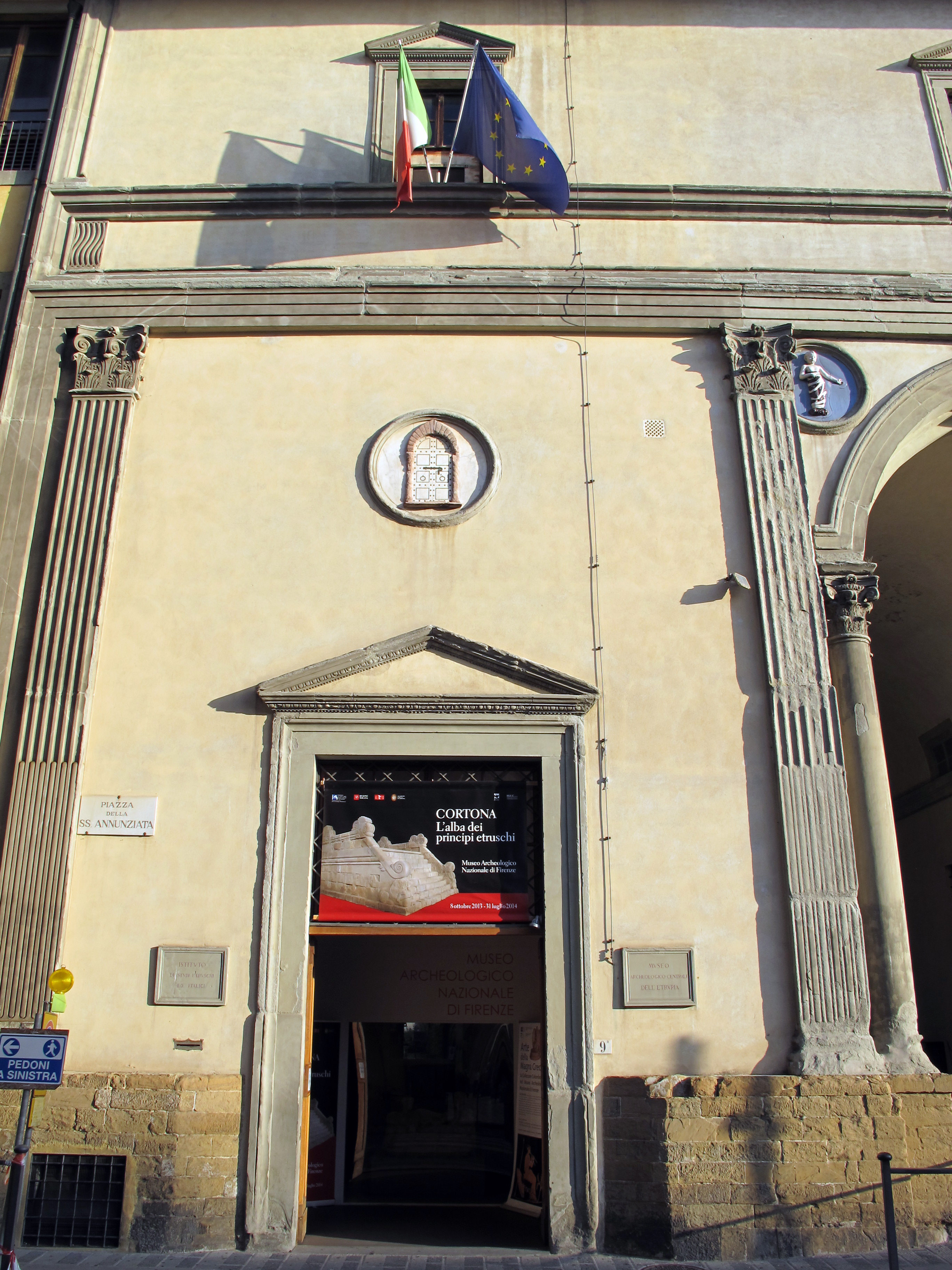 Via della Colonna, Firenze